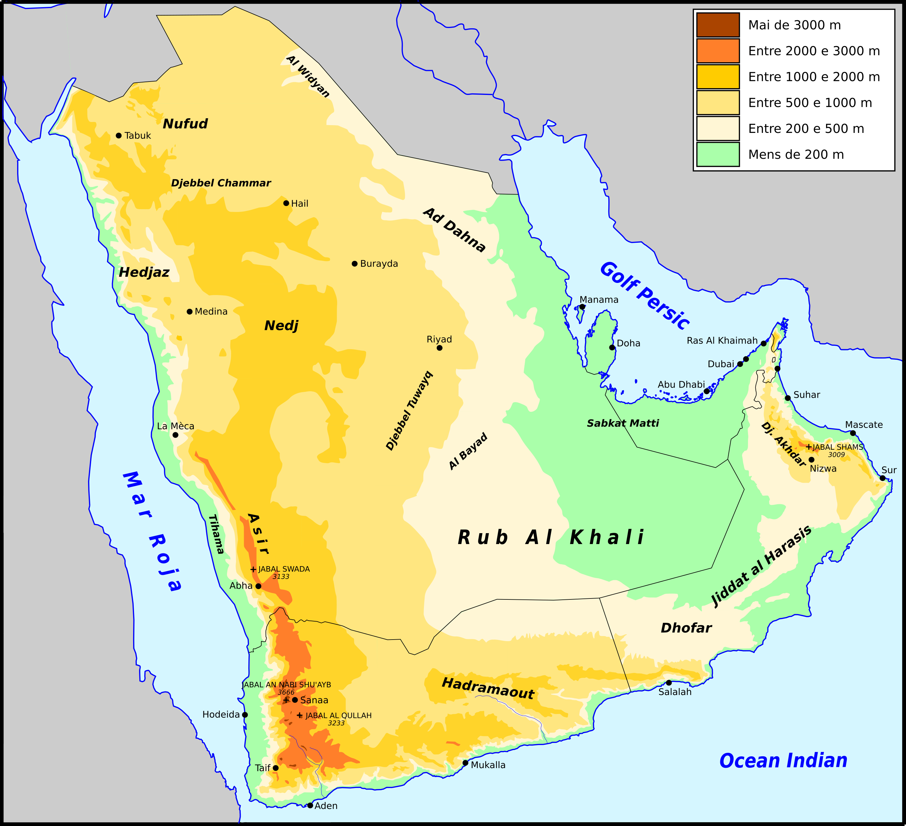 Topografia de la Peninsula Aràbia